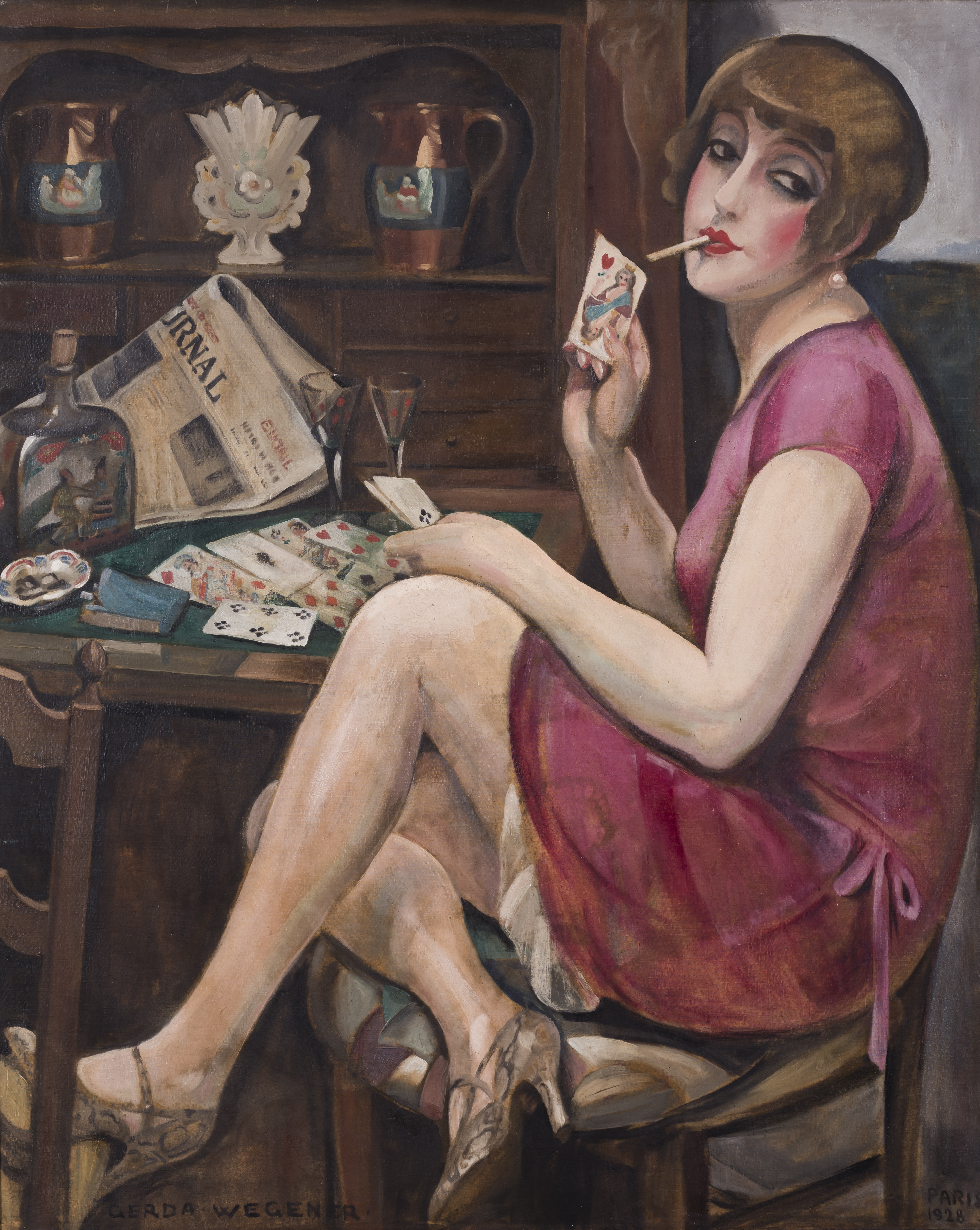 Szív királynő - Lili portéja